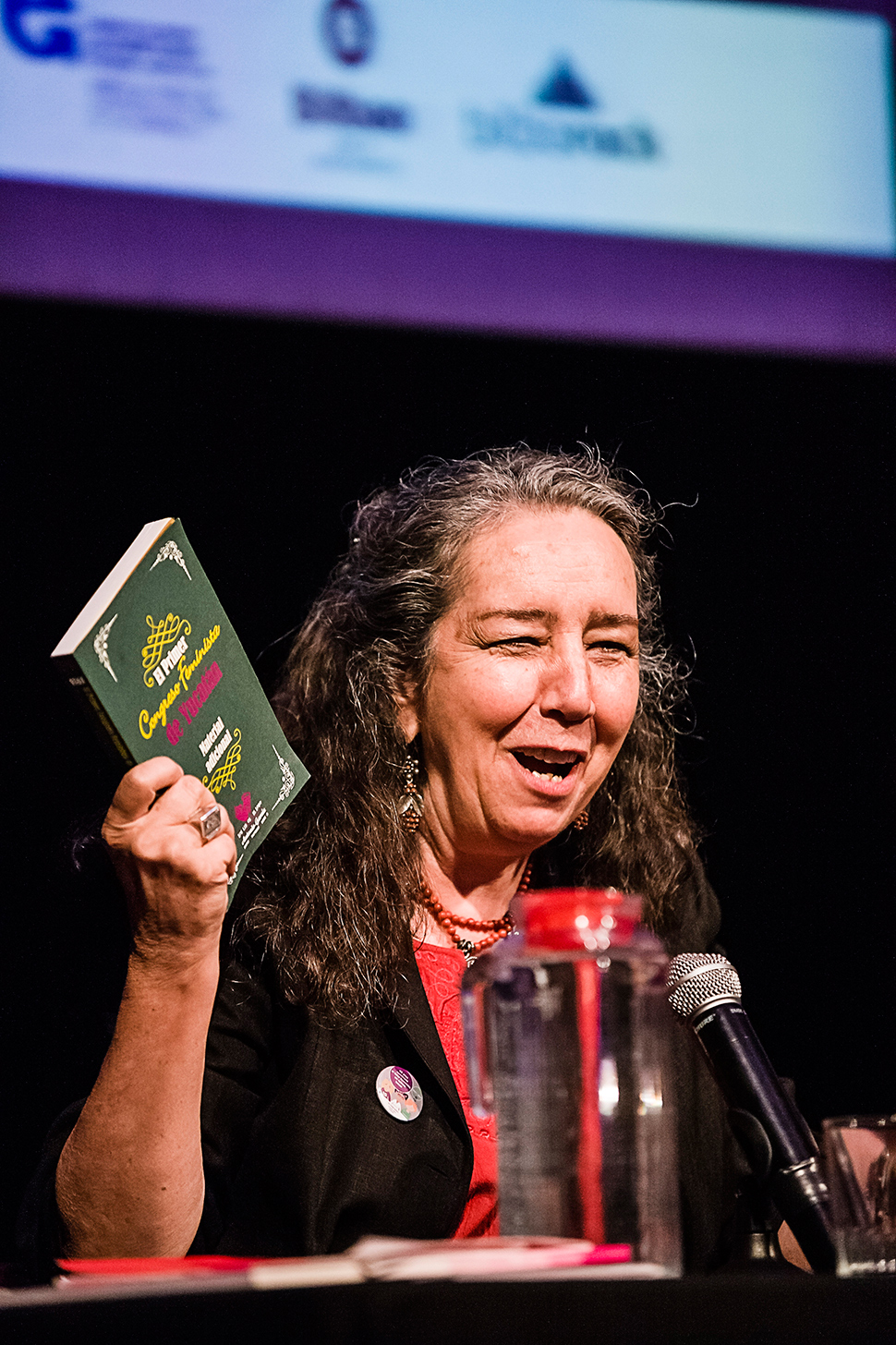 Marcela Lagarde, durante las jornadas ’LegislAcción: Propuestas feministas legislativas para vivir una vida libre de violencias machistas’, organizadas por Mugarik Gabe en Bilbao (noviembre 2017). // J. Marcos (@desplazados_org)